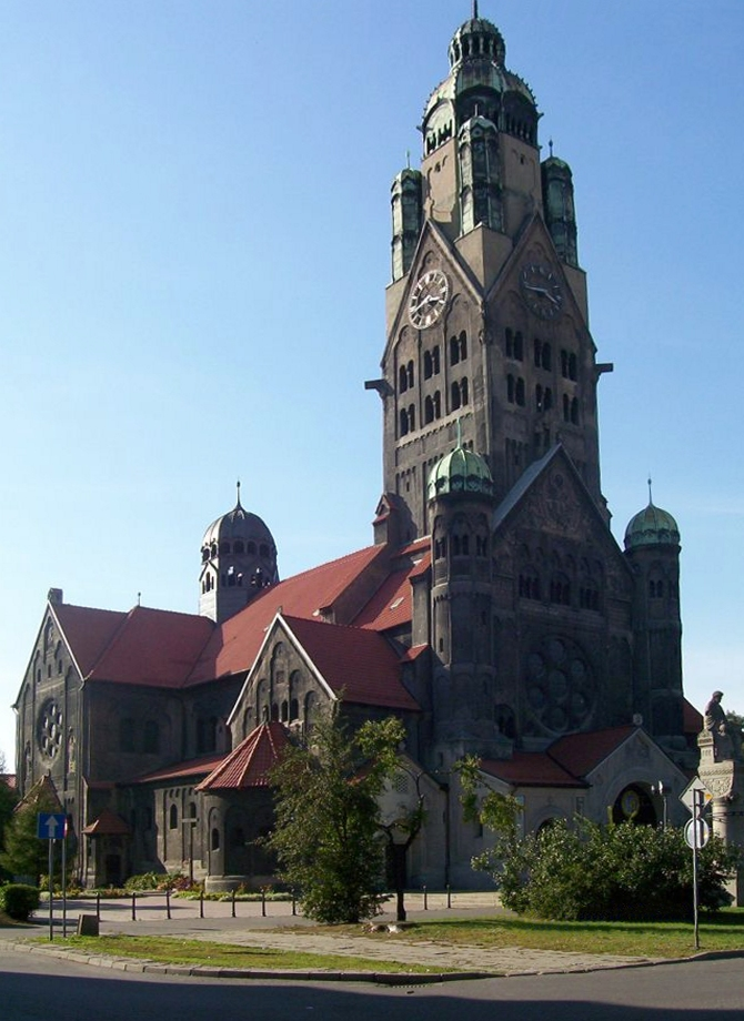 Ruda Śląska Nowy Bytom - Kościół św Pawła na placu Jana Pawła II.